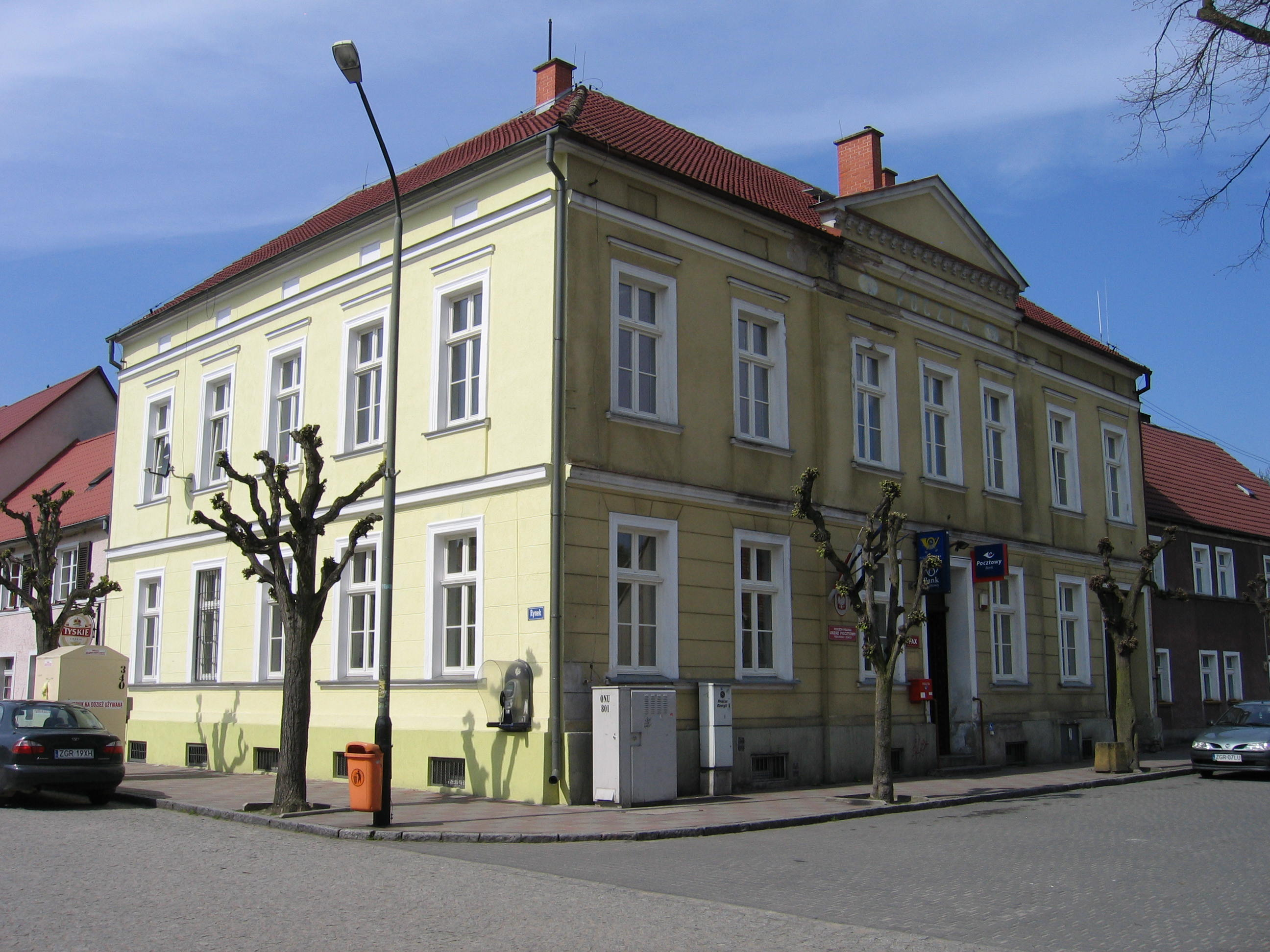 Trzcińsko-Zdrój, Rynek 3 - poczta